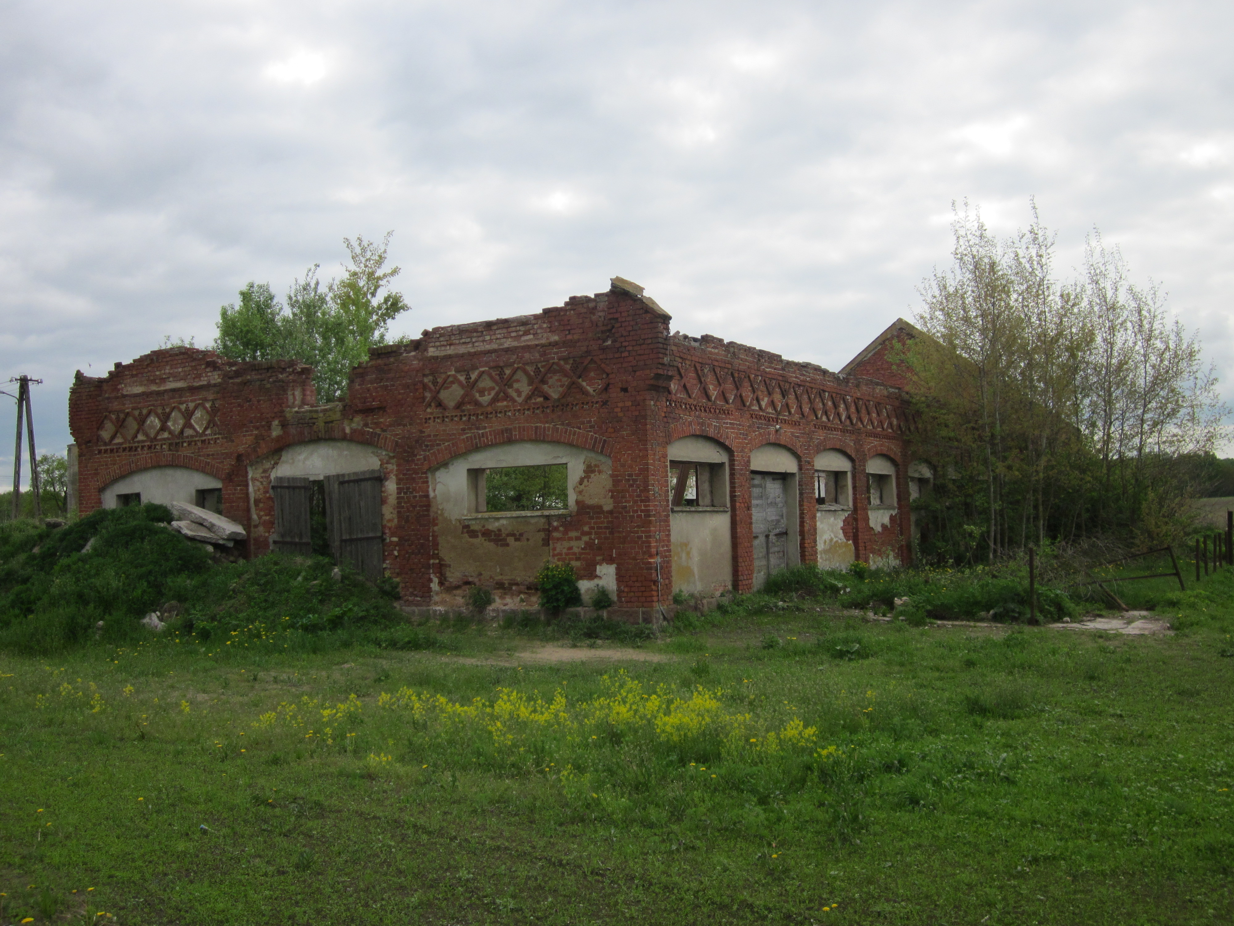 Dawna stajnia dworska z 1894 roku.